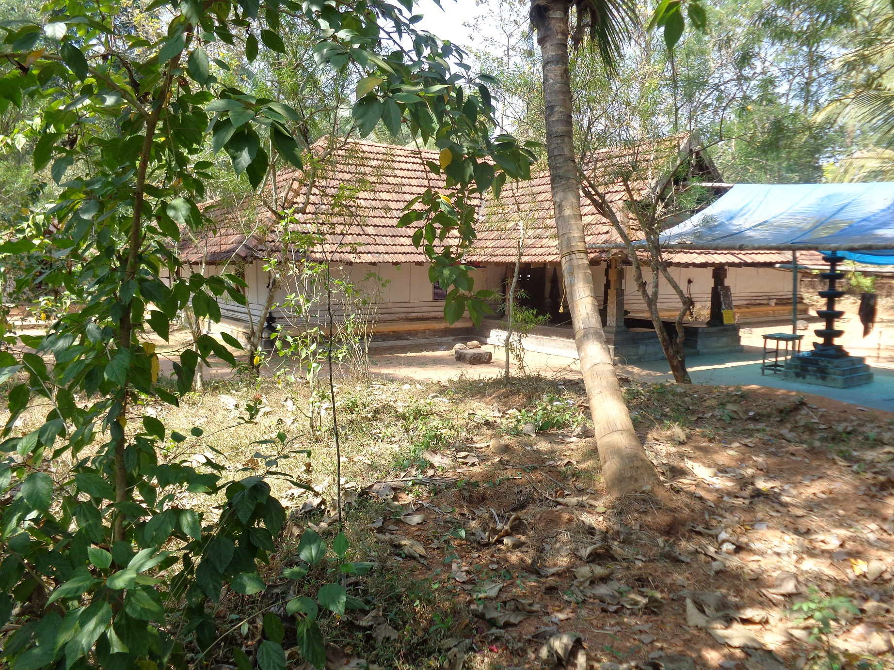 പൂത്രക്കോവ് ക്ഷേത്രം